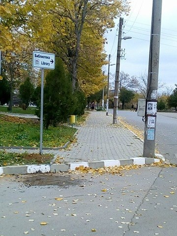 табела за библиотека в Еленово